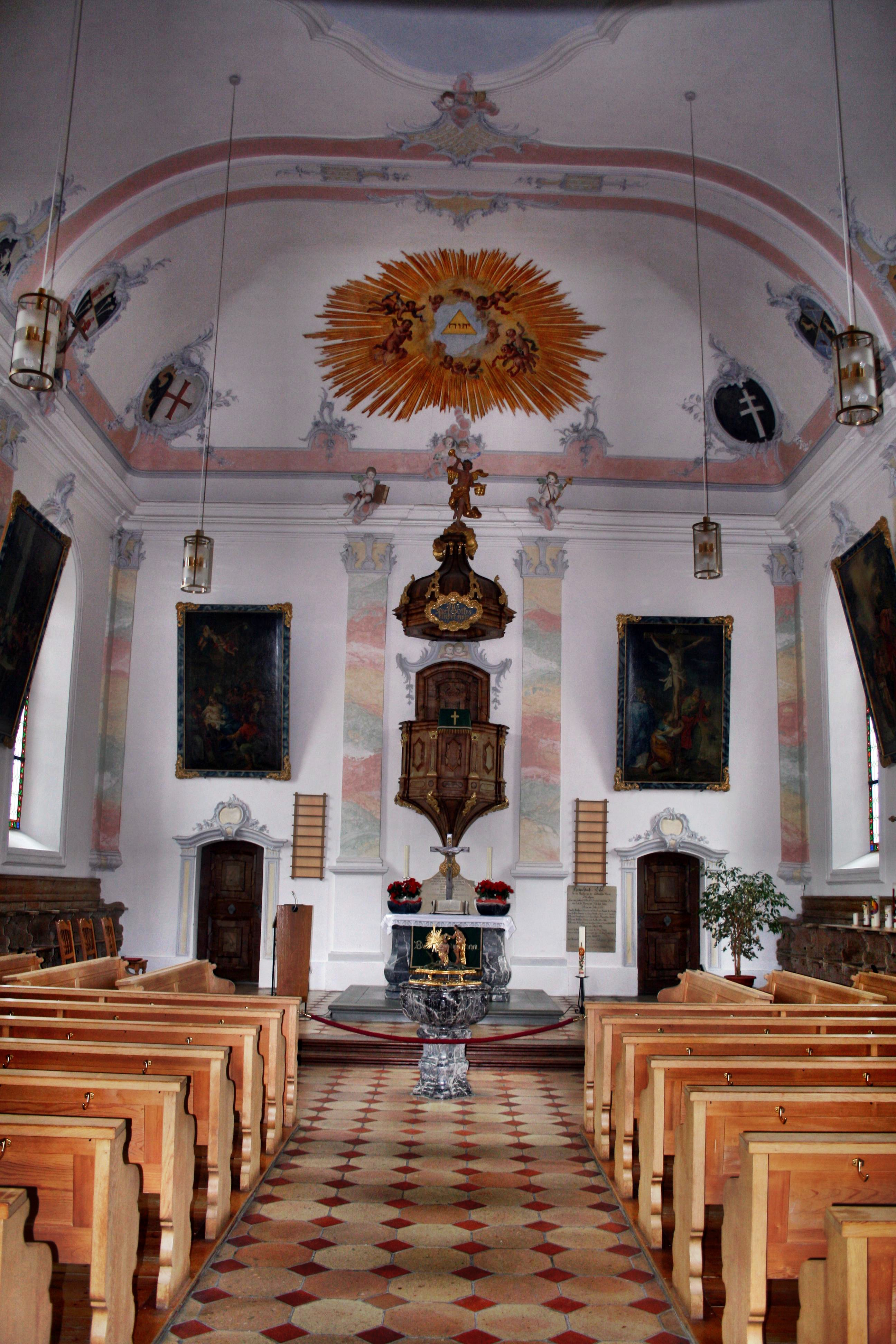 Blick in den Innenraum auf die Kanzel, St. Martin Memmingen-Steinheim